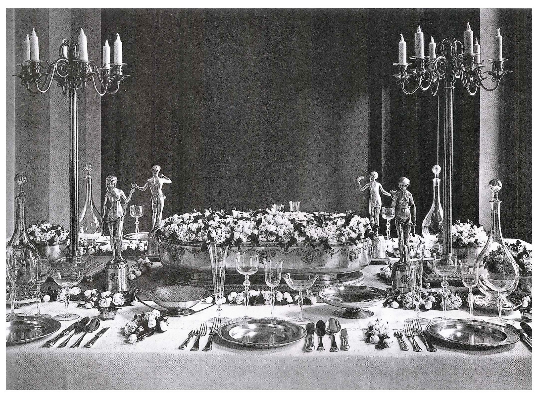 Tafel mit Teilen des Kronprinzensilbers 1916; Geschenk des Preußischen Städtetages anlässlich der Hochzeit von Kronprinz Friedrich und Prinzessin Cecilie von Mecklenburg